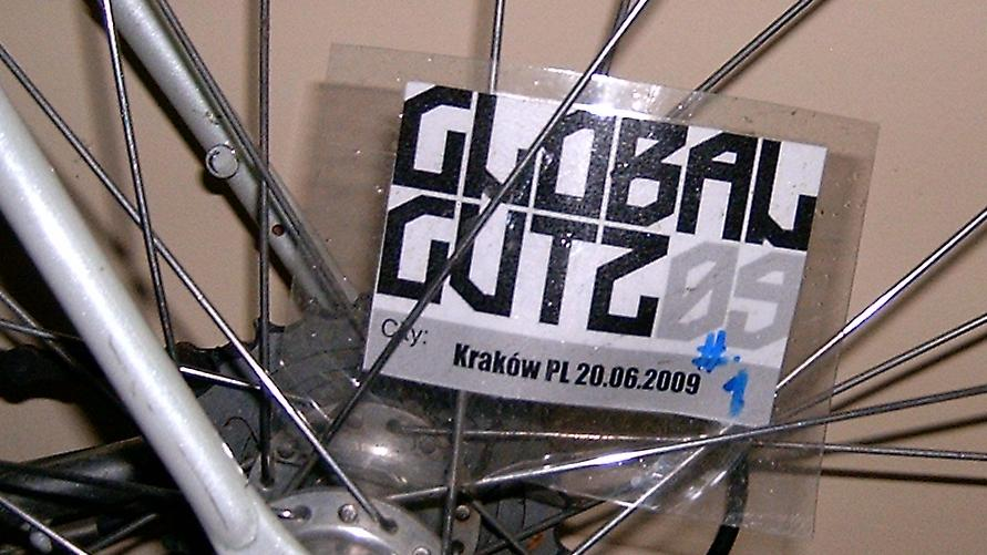 szprychowka global gutz krakow